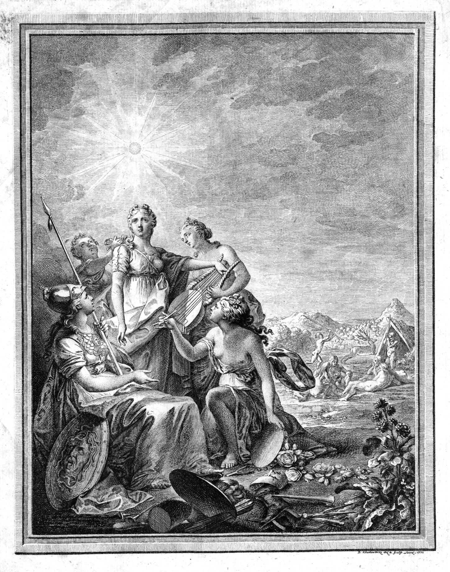 Johann Georg Sulzer: "Allgemeine Theorie der Schönen Künste". Titelkupferstich.